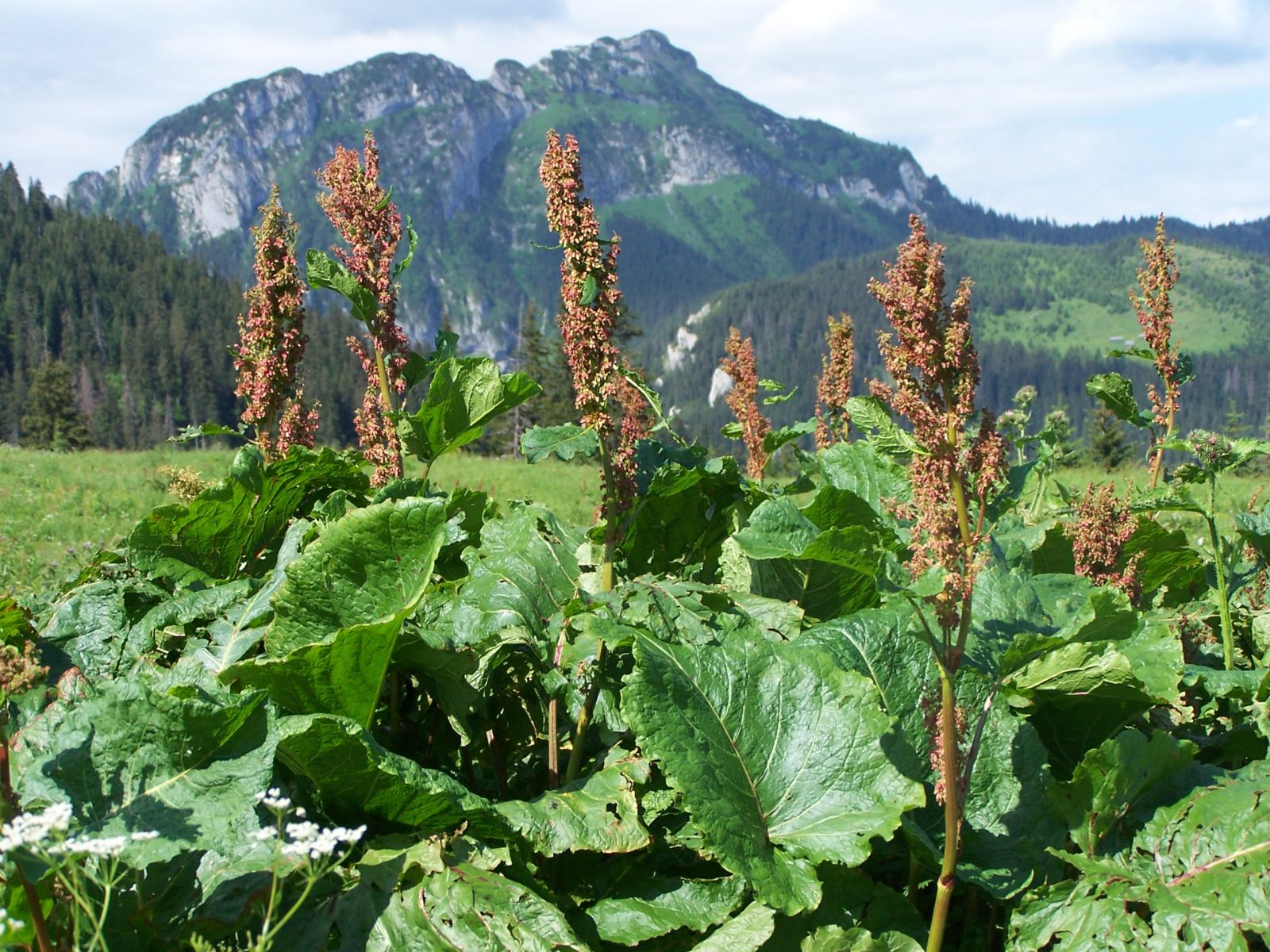 Rumex alpinus (pl. szczaw alpejski), habitat: West Tatra Mountains, Polana Upłaz